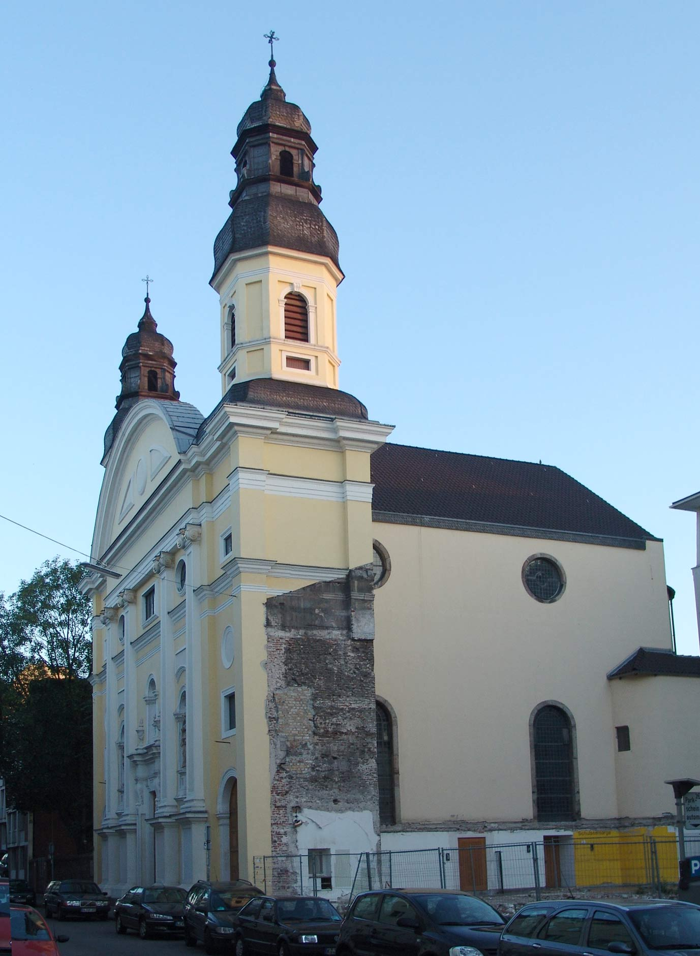 Ursulinenkirche (Köln) nach Abriß des östlichen Nachbargebäudes